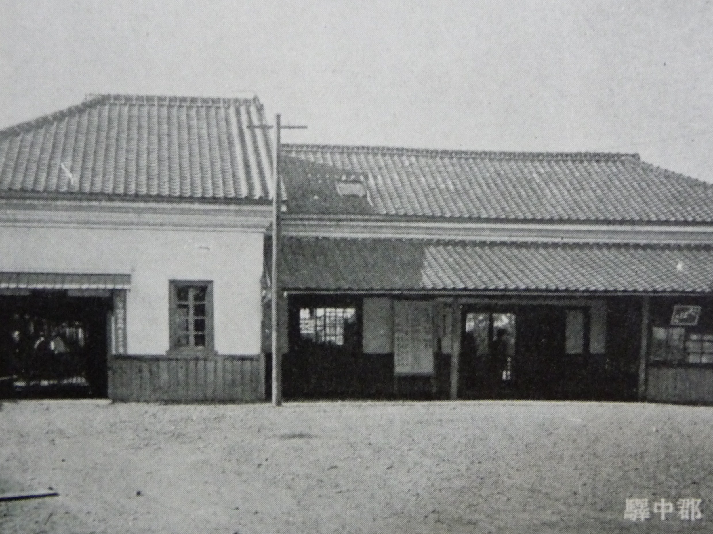 伊予鉄郡中駅